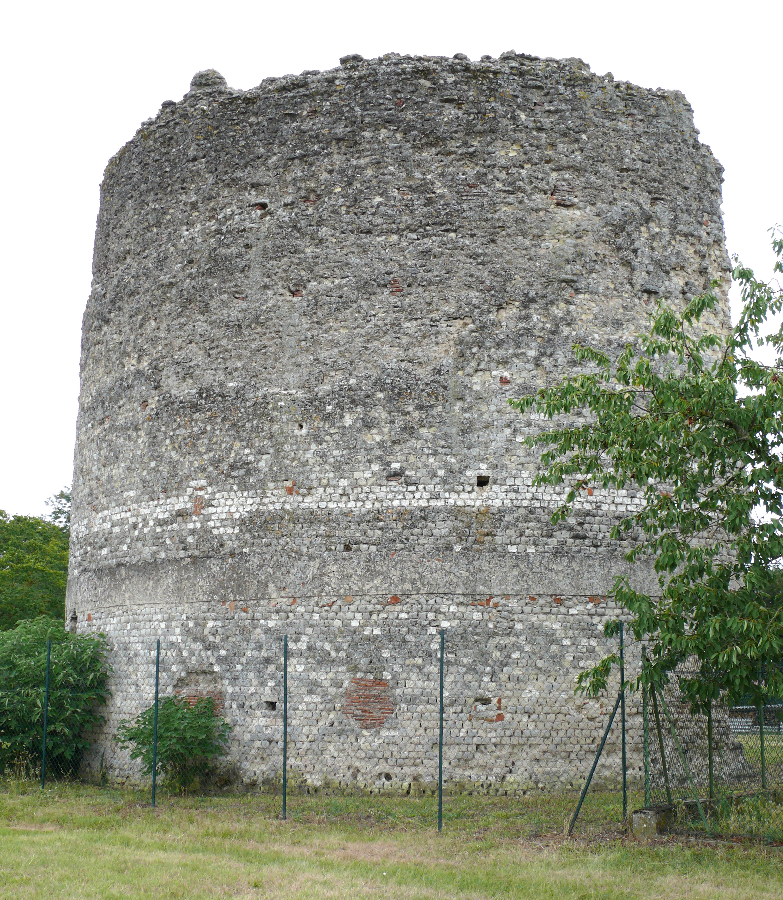 Villeneuve-sur-Lot - Tour romaine d'Eysses